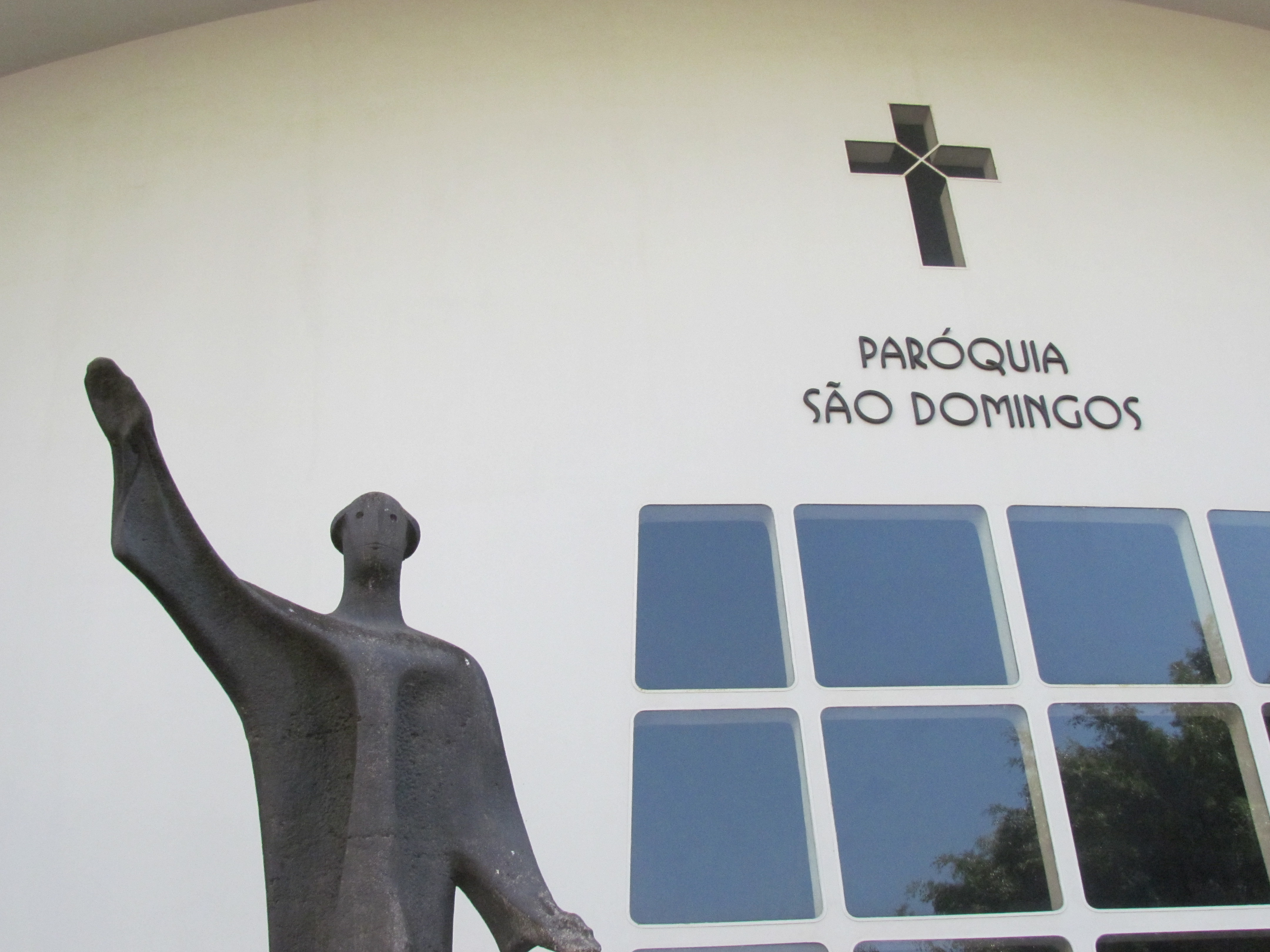 Fachada da Igreja de São Domingos, em São Paulo (SP), Brasil.